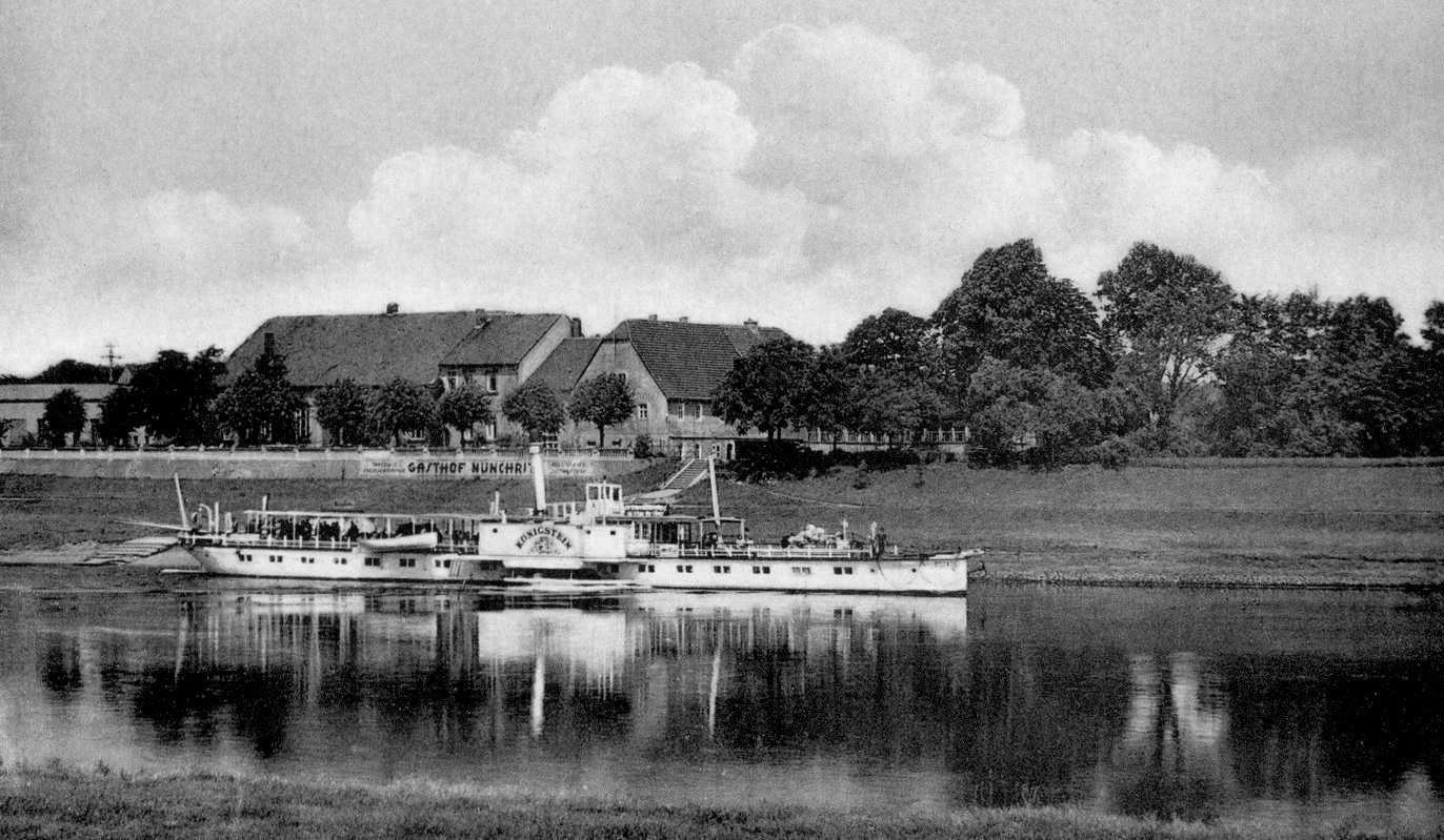 Nünchritz; Elbgasthof - Elbe mit Dampfer Königstein This postcard is from publisher Brück & Sohn in Meißen ( postcard has a unique number 28245 and is available in a higher resolution at the publisher. This images was uploaded in a cooperation project between Wikipedians and the publisher.